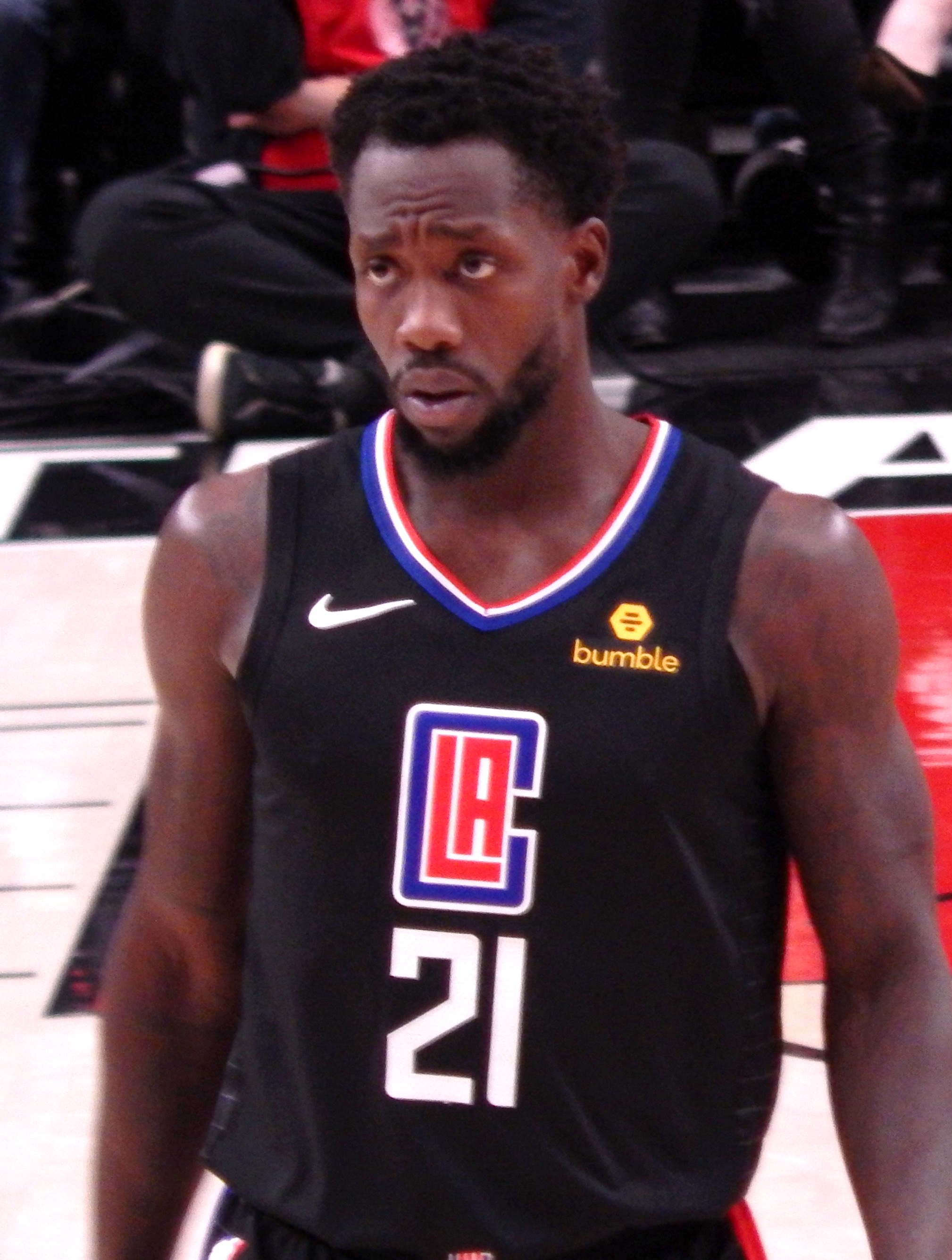 Patrick Beverley #21 of the Los Angeles Clippers against the Portland Trail Blazers on November 8, 2018 at Moda Center in Portland, Oregon.